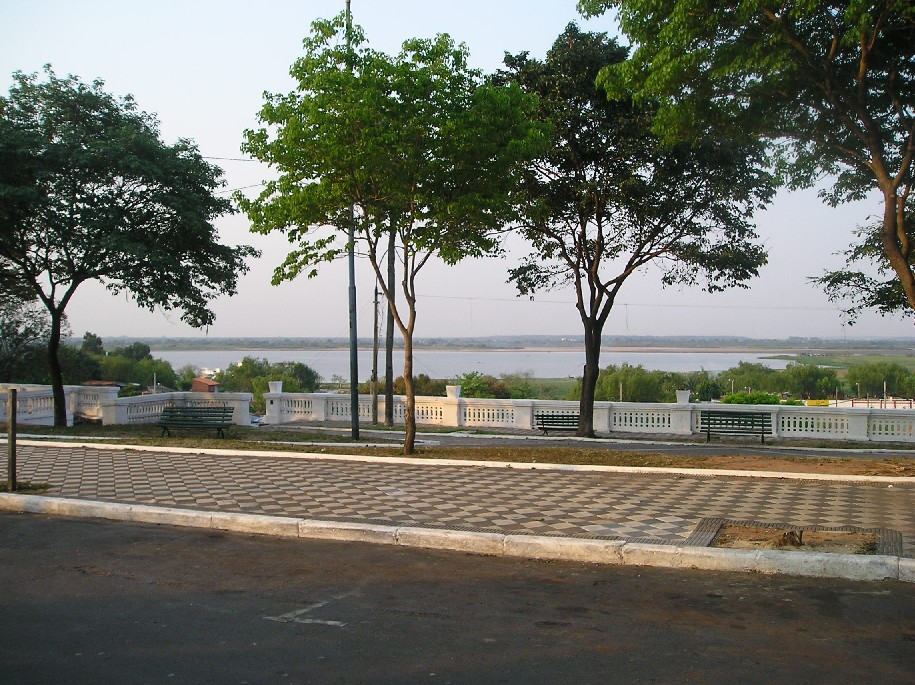 Asunción. Barranca al Río Paraguay. Plaza de la Independencia